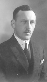 Konstantin Grimm